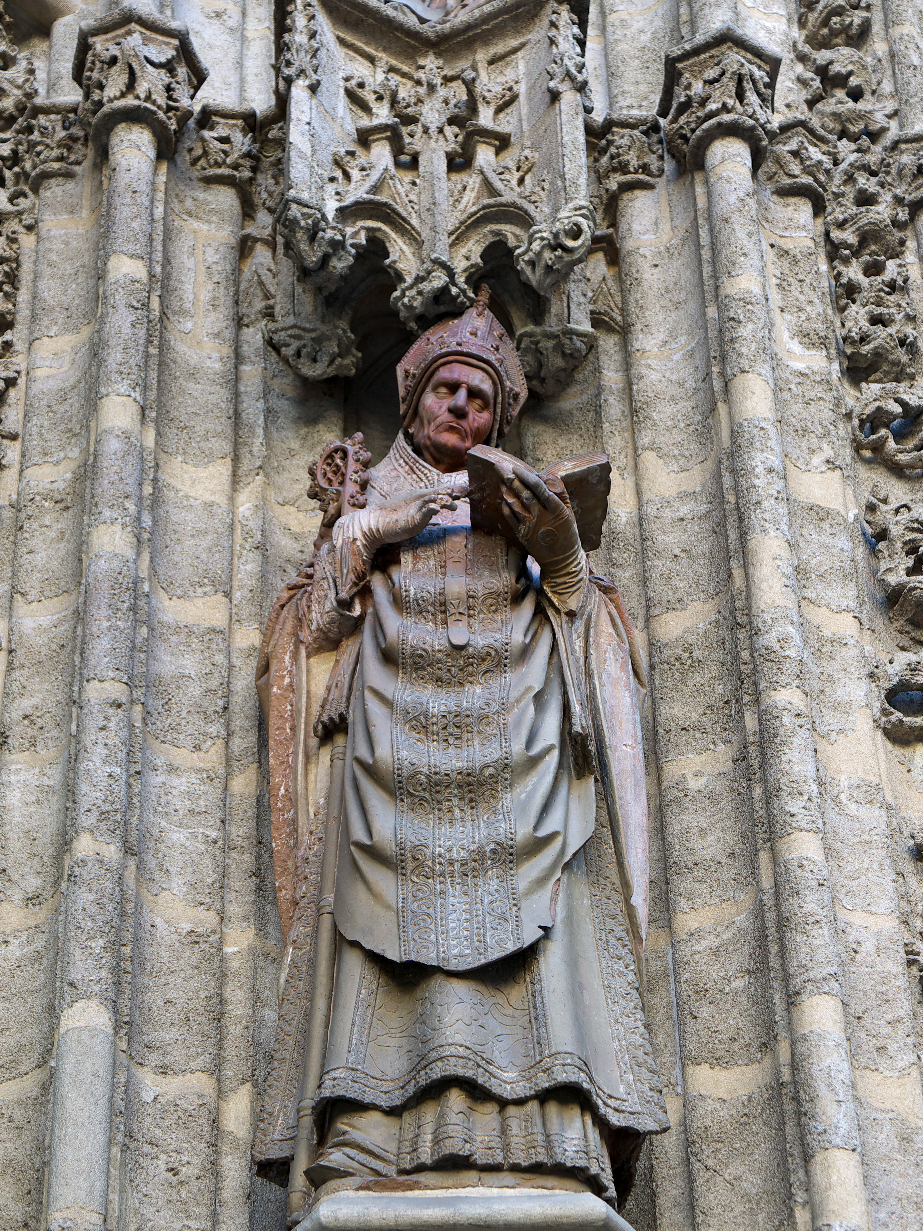 Jamba izquierda de la portada. Atribuida a Lorenzo Mercadante de Bretaña (h. 1467), barro cocido, posiblemente policromado en su origen.